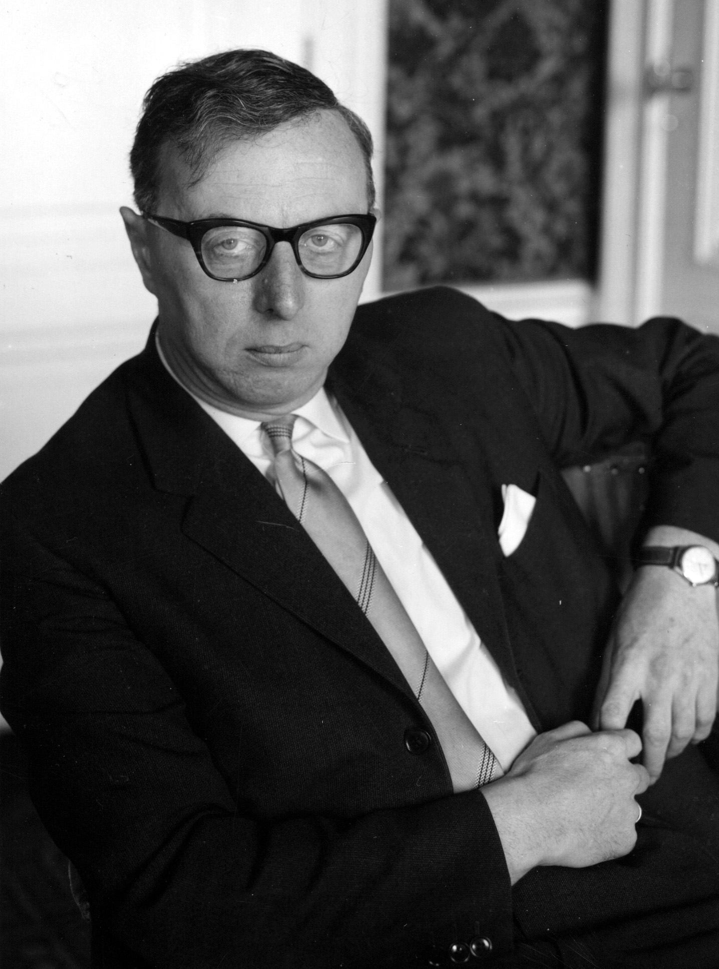 Jelle Zijlstra. Minister-president van Nederland (1966-1967)